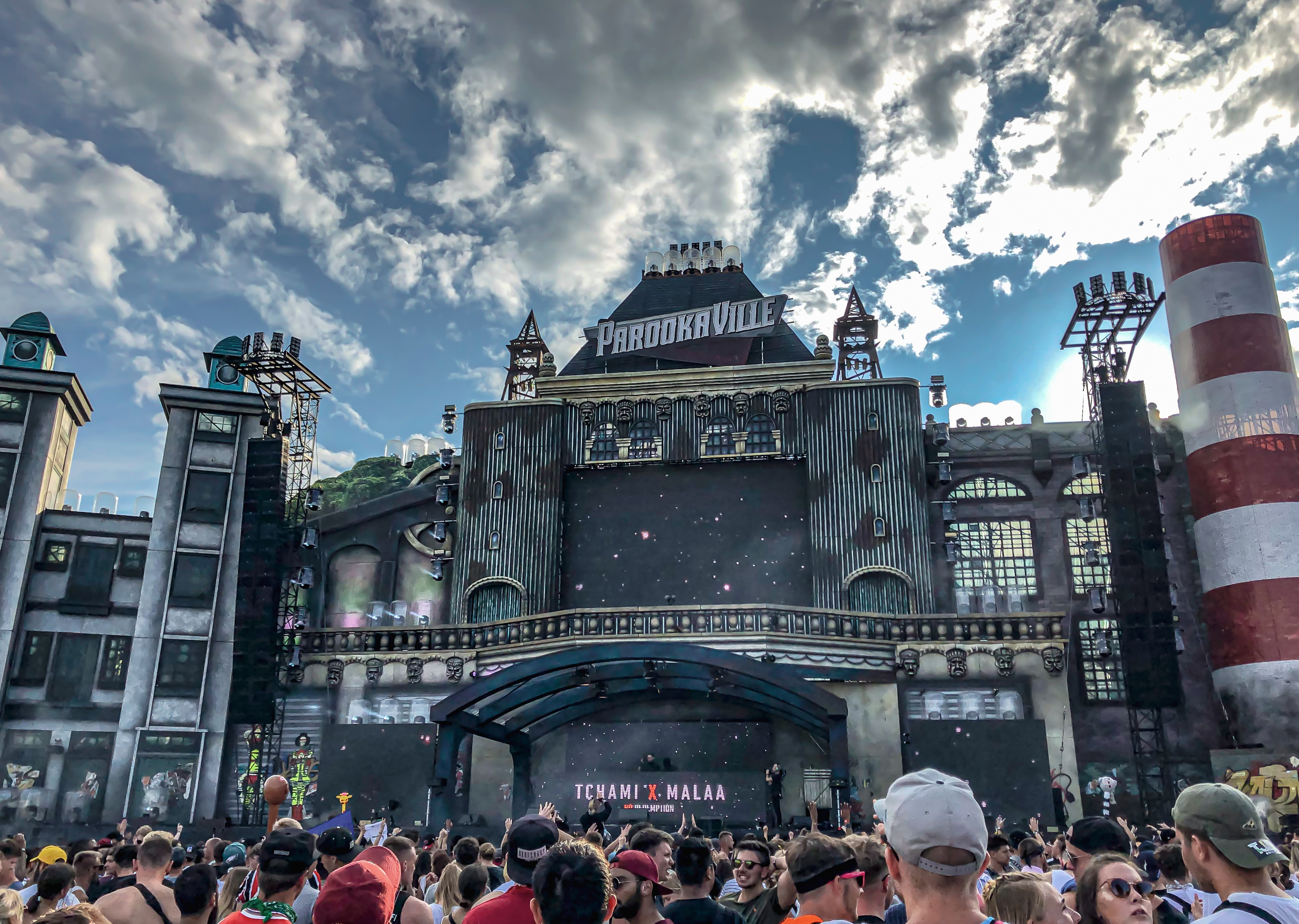 Bills Factory Parookaville 2019